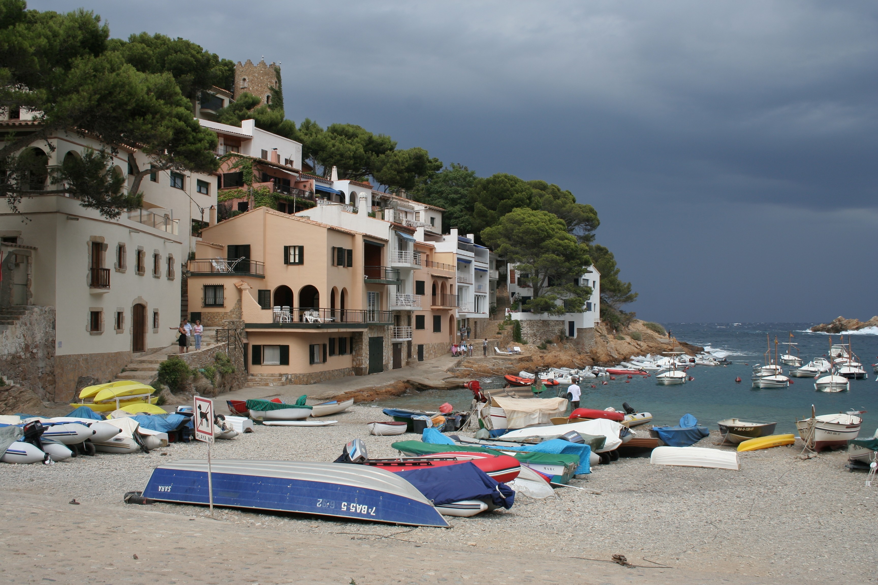 Sa tuna nucleo de población y playa del minicipio de Begur